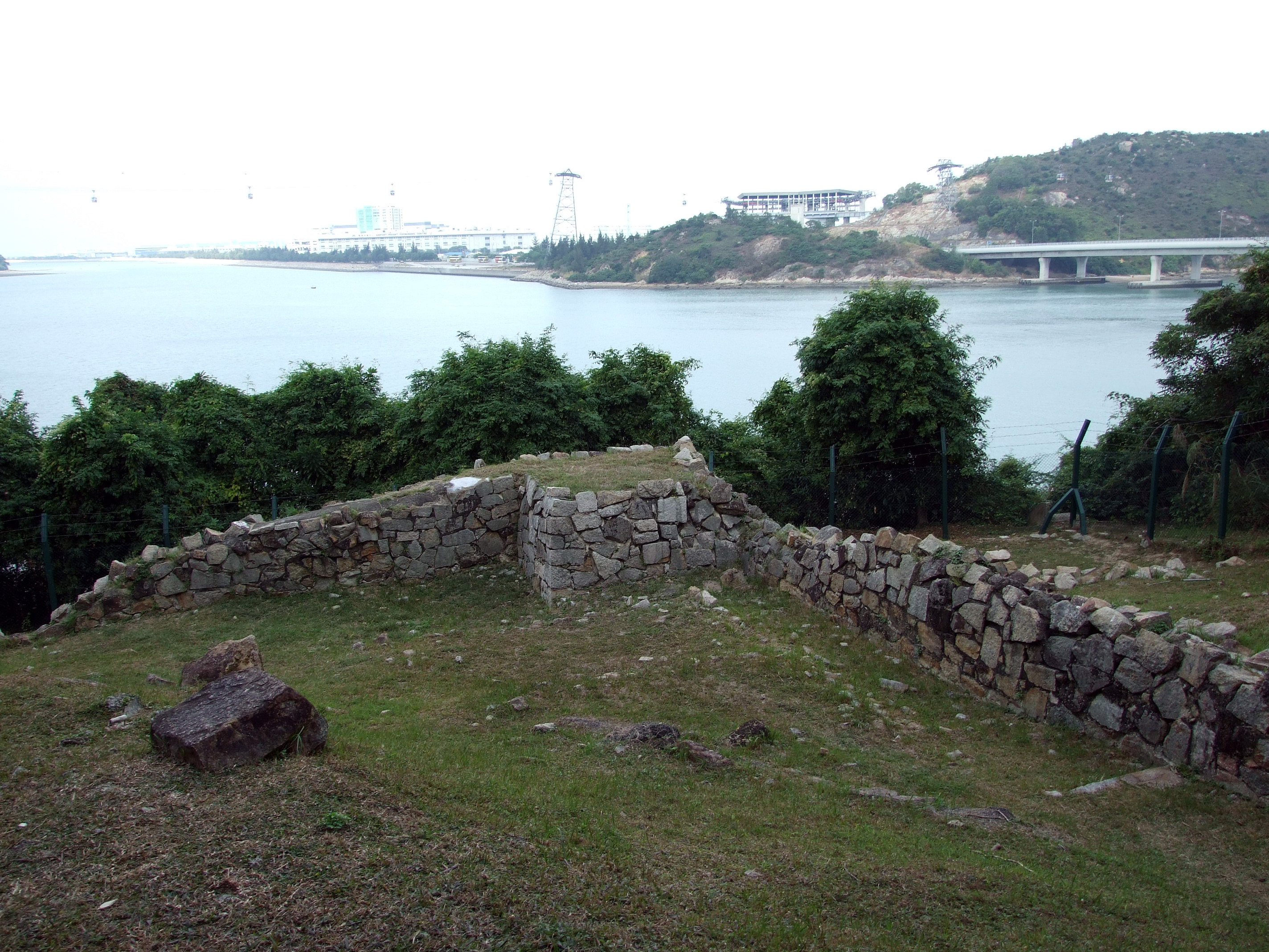 中文（香港）: 東涌小炮台